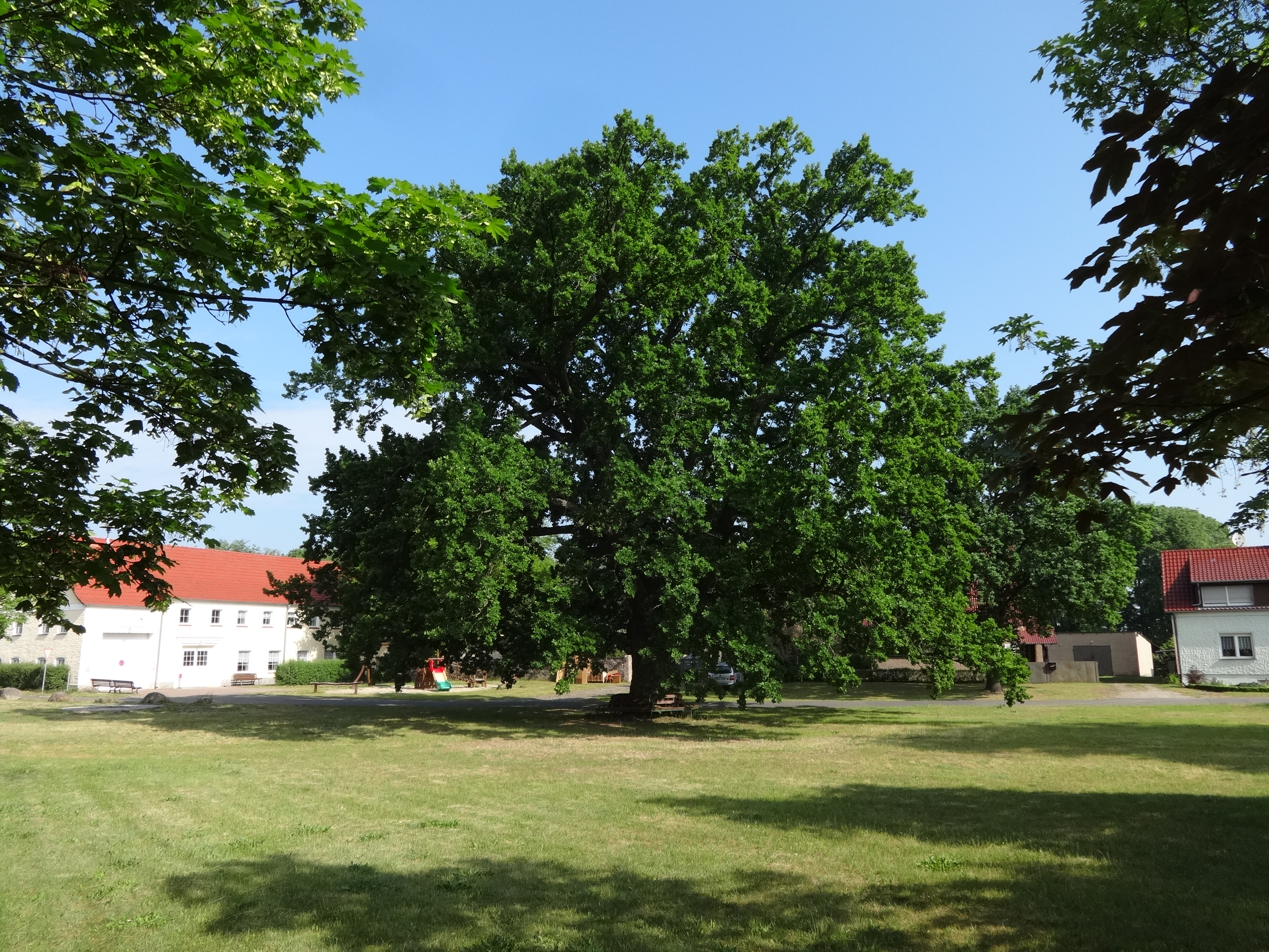 Zentraler Dorfplatz in Schwerin, Storkow (Mark), Brandenburg